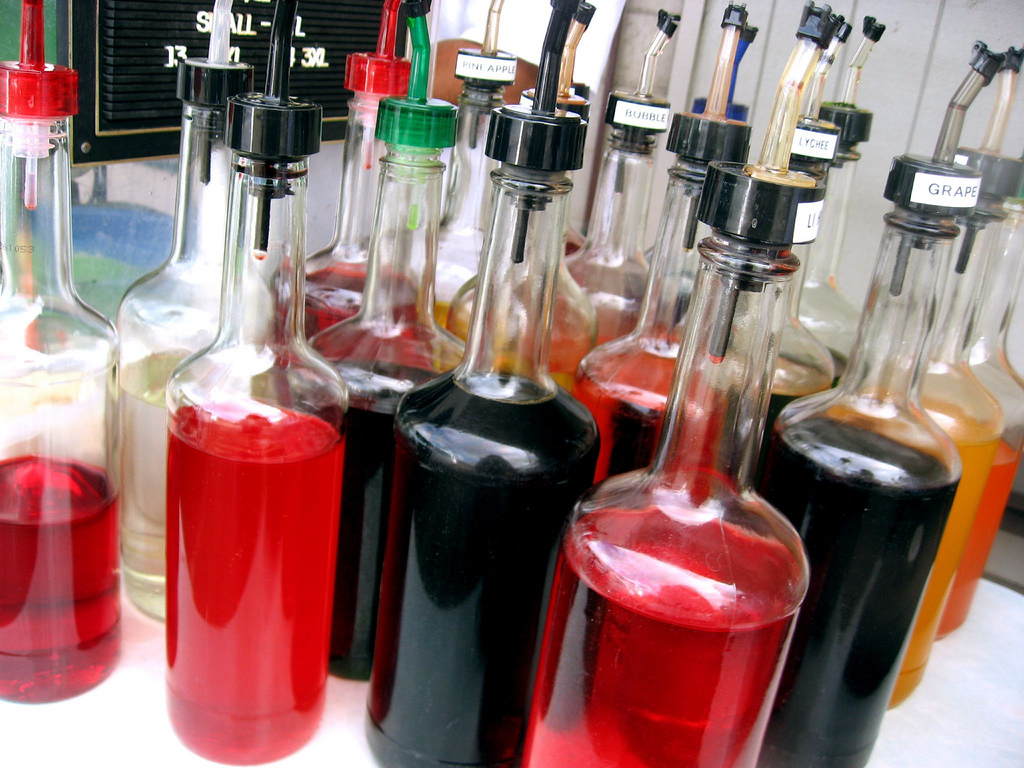 Hawaiian Blizzard syrup